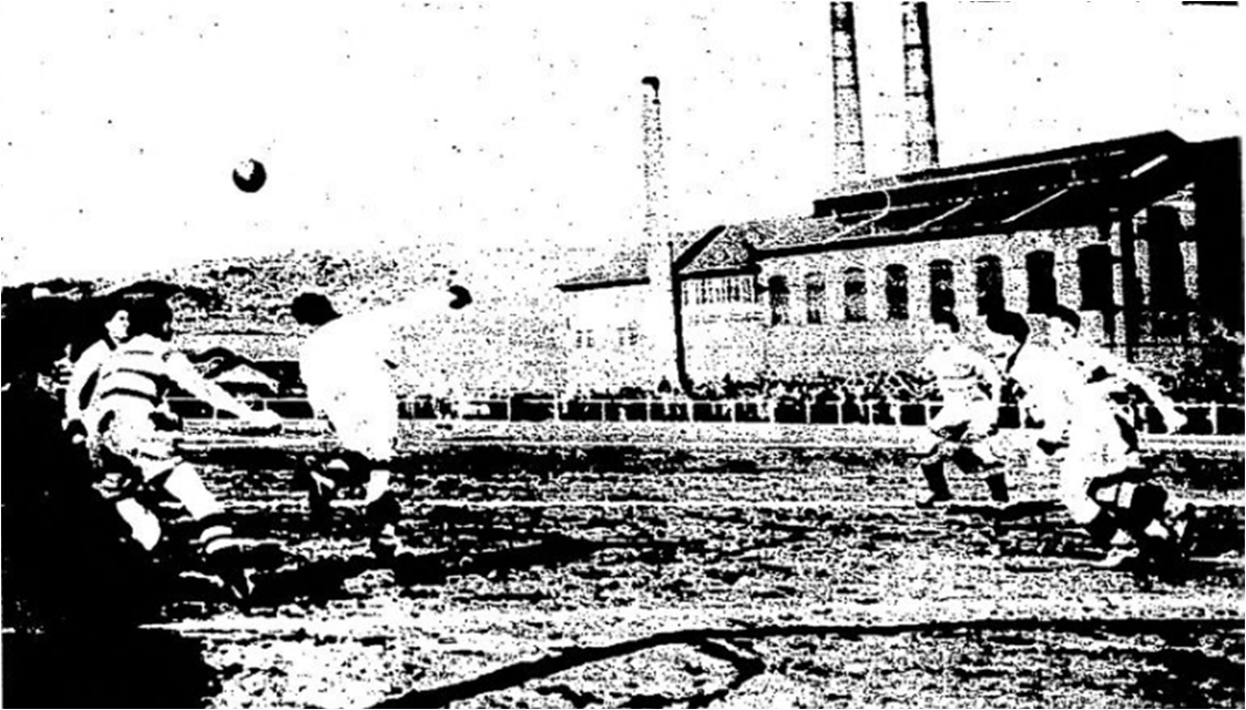 Dimanche 4 mars 1934 à Saint-Etienne, quart de finale de la Coupe de France de football 1933-1934 entre l'Amiens AC et le FC Sète. Beck, de dos à gauche, s'appretant à recevoir la balle.